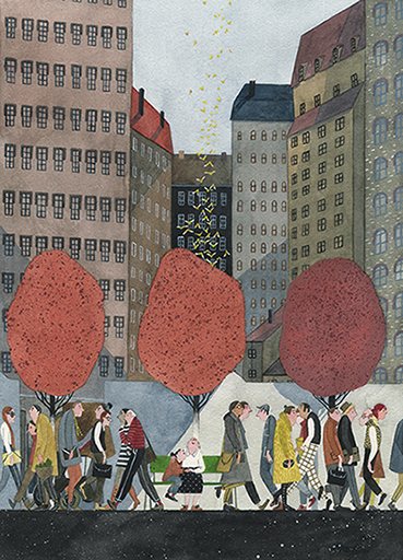 Amona Maria, Maite Gurrutxagaren ilustrazioa